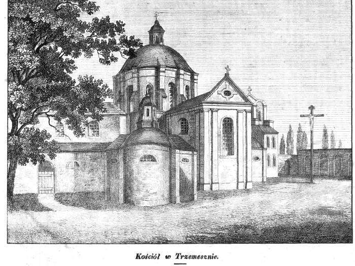 Kościół w Trzemesznie. Rycina opublikowana w piśmie "Przyjaciel Ludu" w 1843 r.